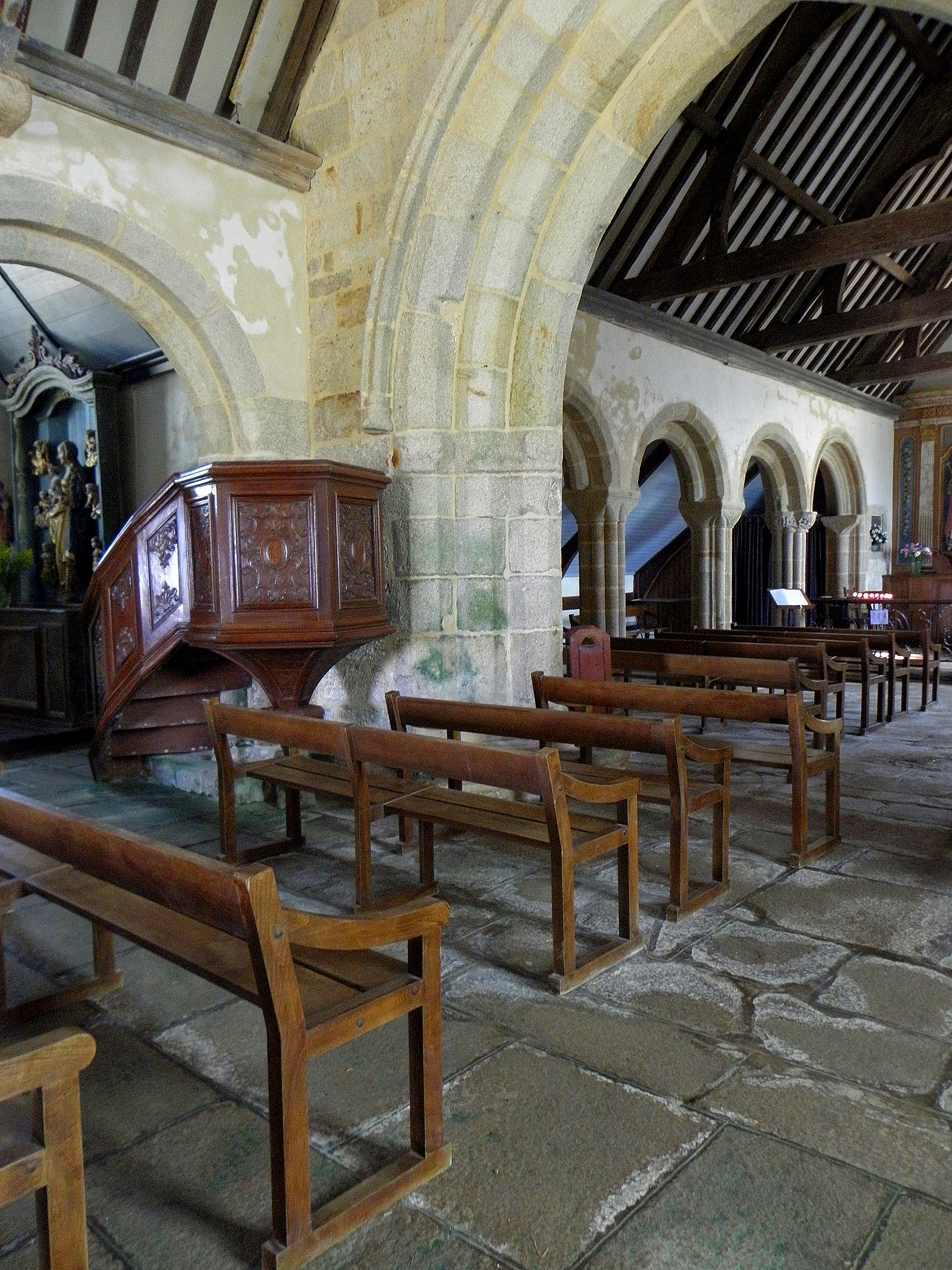 Chapelle Notre-Dame-de-Penhors en Pouldreuzic (29). Costale nord du chœur et arc triomphal.